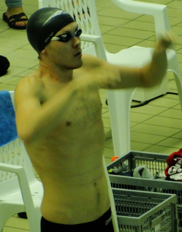 Mateusz Sawrymowicz Zdjęcie wykonane podczas Grand Prix Polski w pływaniu, Kraków 2012.